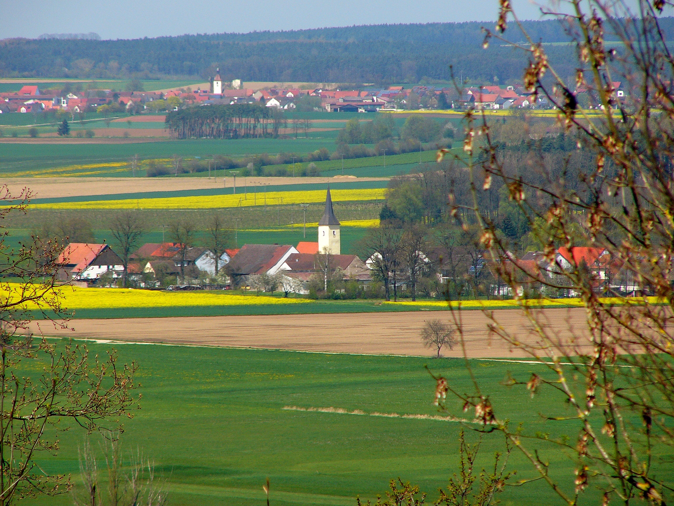 Blick auf Häusern und Meckenhausen, beides OT von Hilpoltstein. Fotografier in der Nähe von Obermässing (Greding).